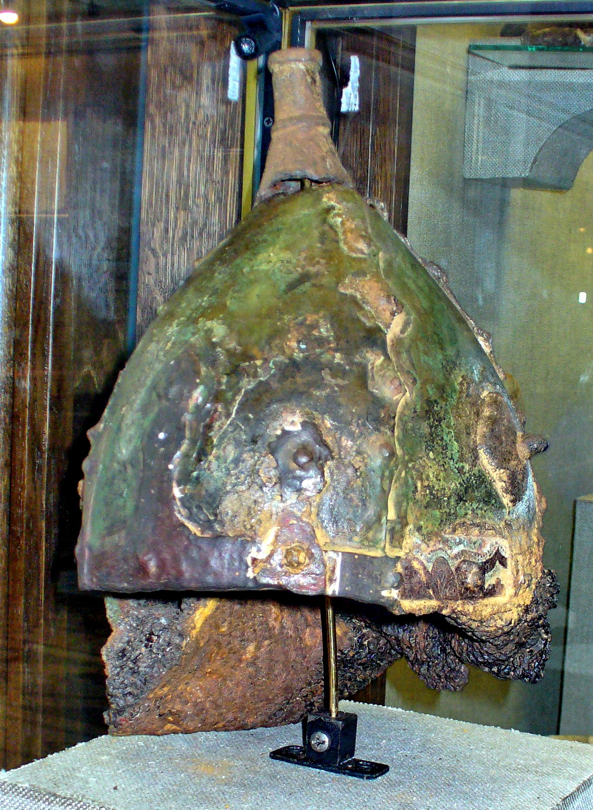 Шлем из Чёрной Могилы, Чернигов №4. Русь, X век.